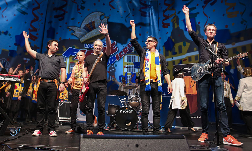 Clemens Roer schrieb für die Bonner Karnevalssession 2017/2018 das Mottolied "Karnevalsdiplom (fiere und studiere)".